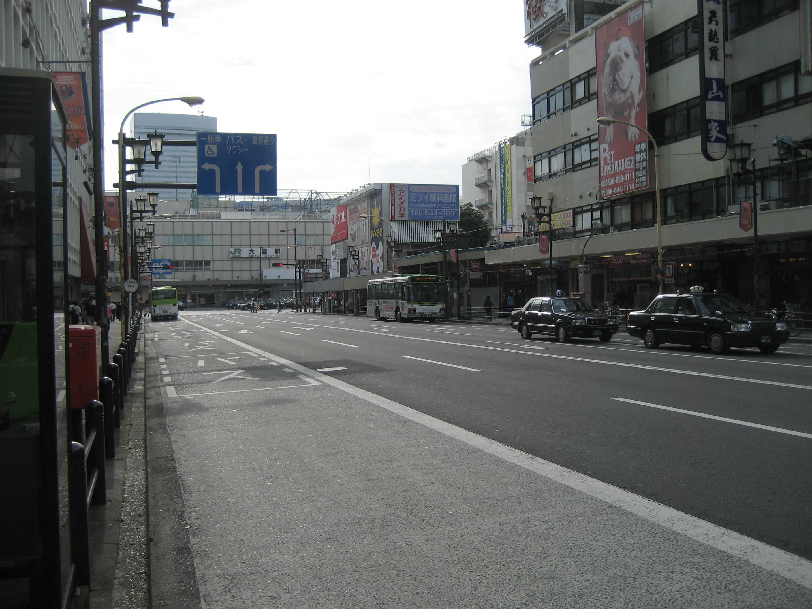 埼玉県道90号。奥は大宮駅。